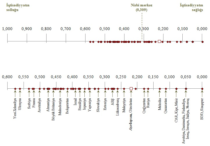 MƏH sub-indeksinə görə ölkələrin yeri